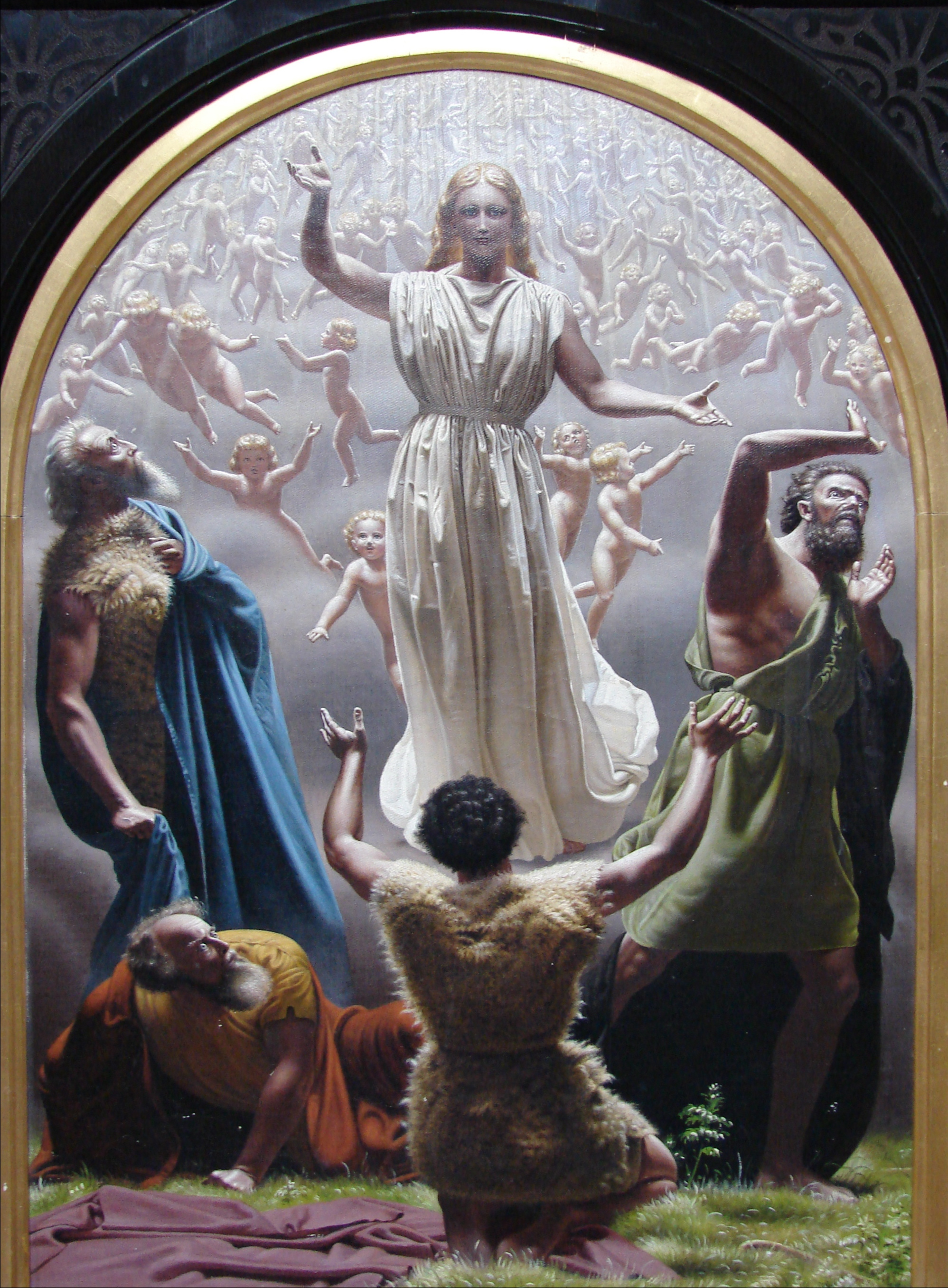 Hyrderne julenat, maleri af Christen Dalsgaard (1824-1907), Sorø Klosterkirke, Sjælland